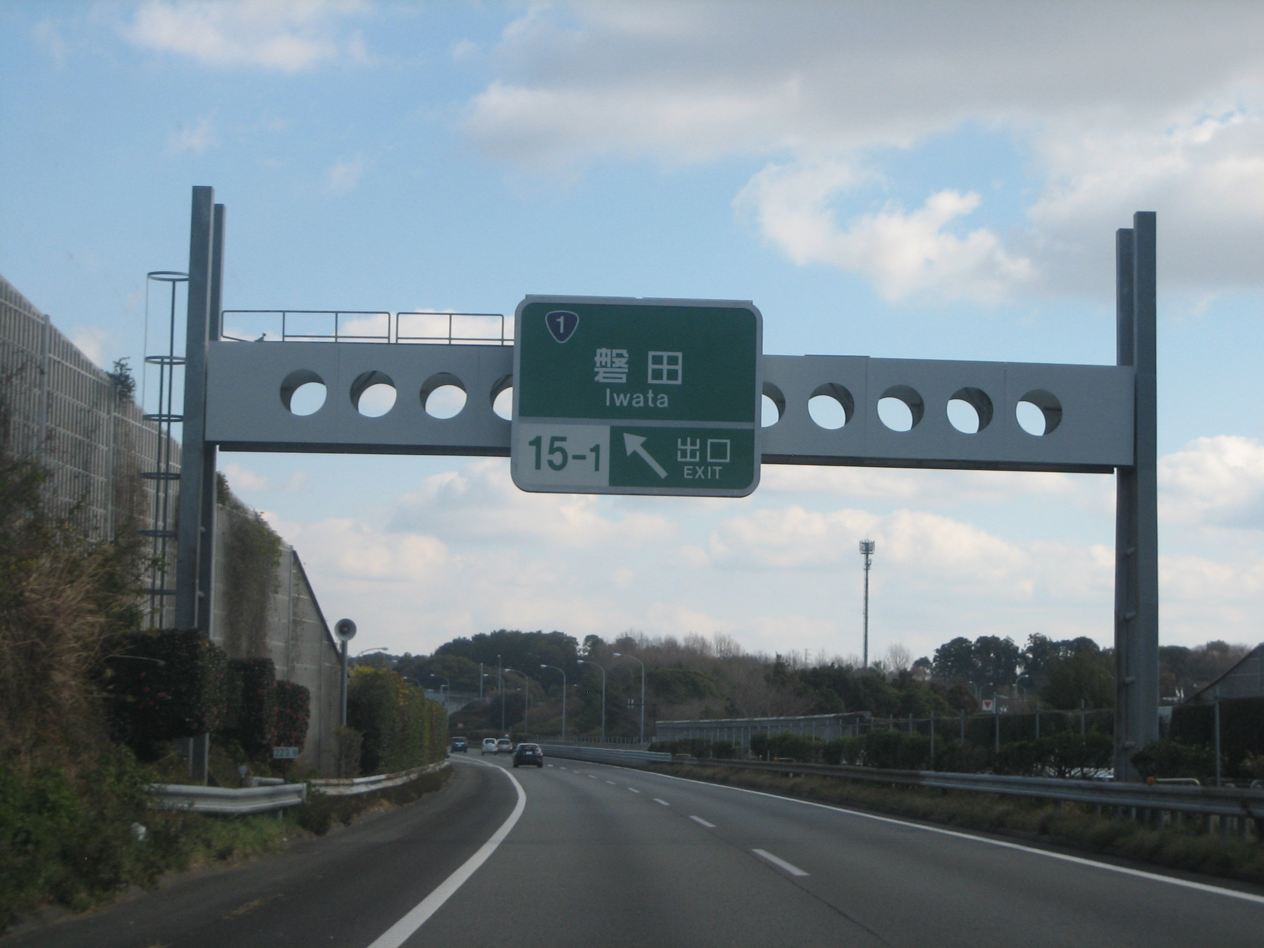 磐田IC